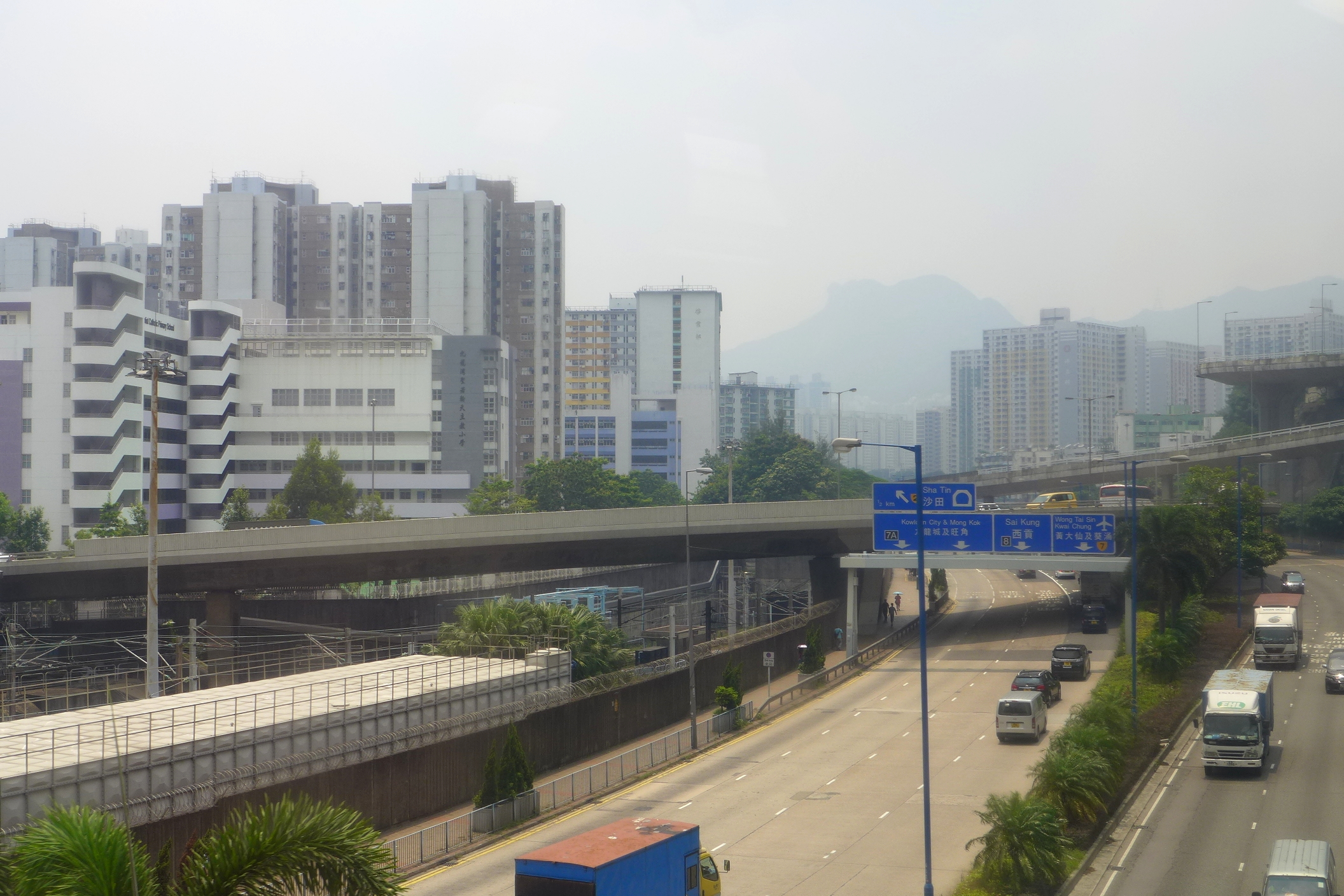 Kwun Tong Road